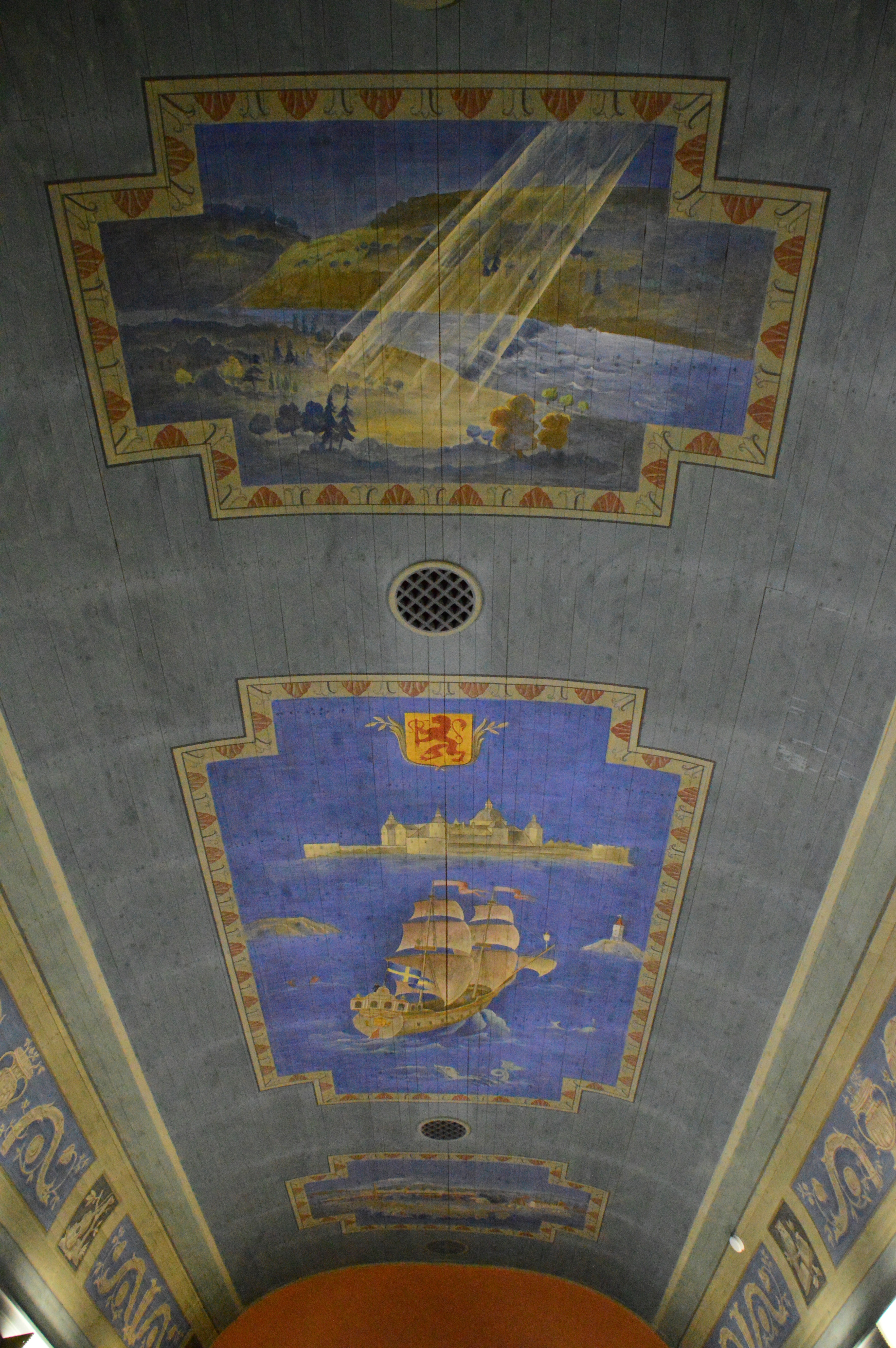 Takmålning